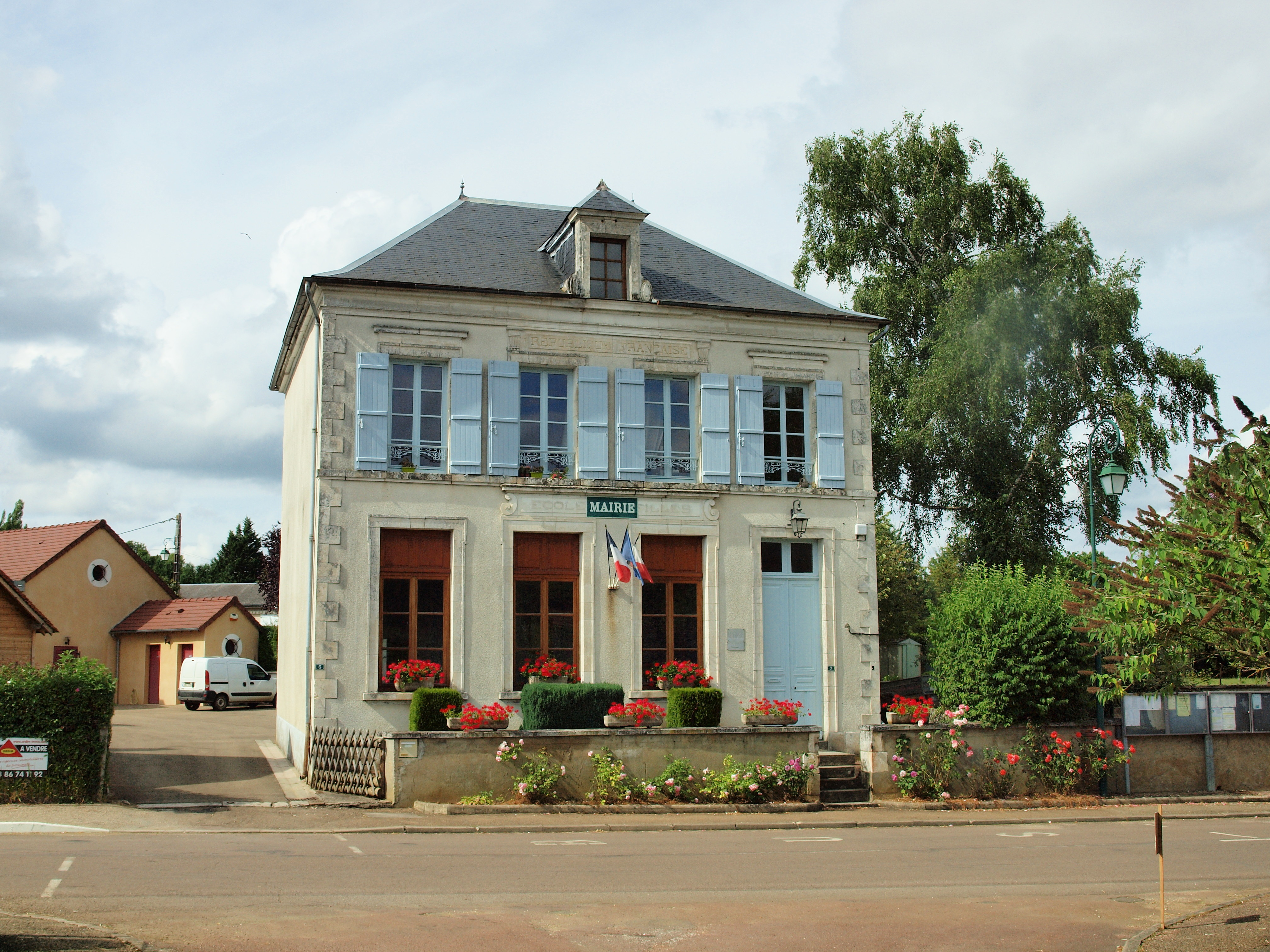 Mairie de Fontenoy (Yonne, France)